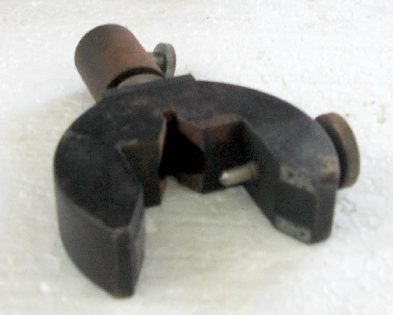 Schmaler Reiter für eine optische Bank